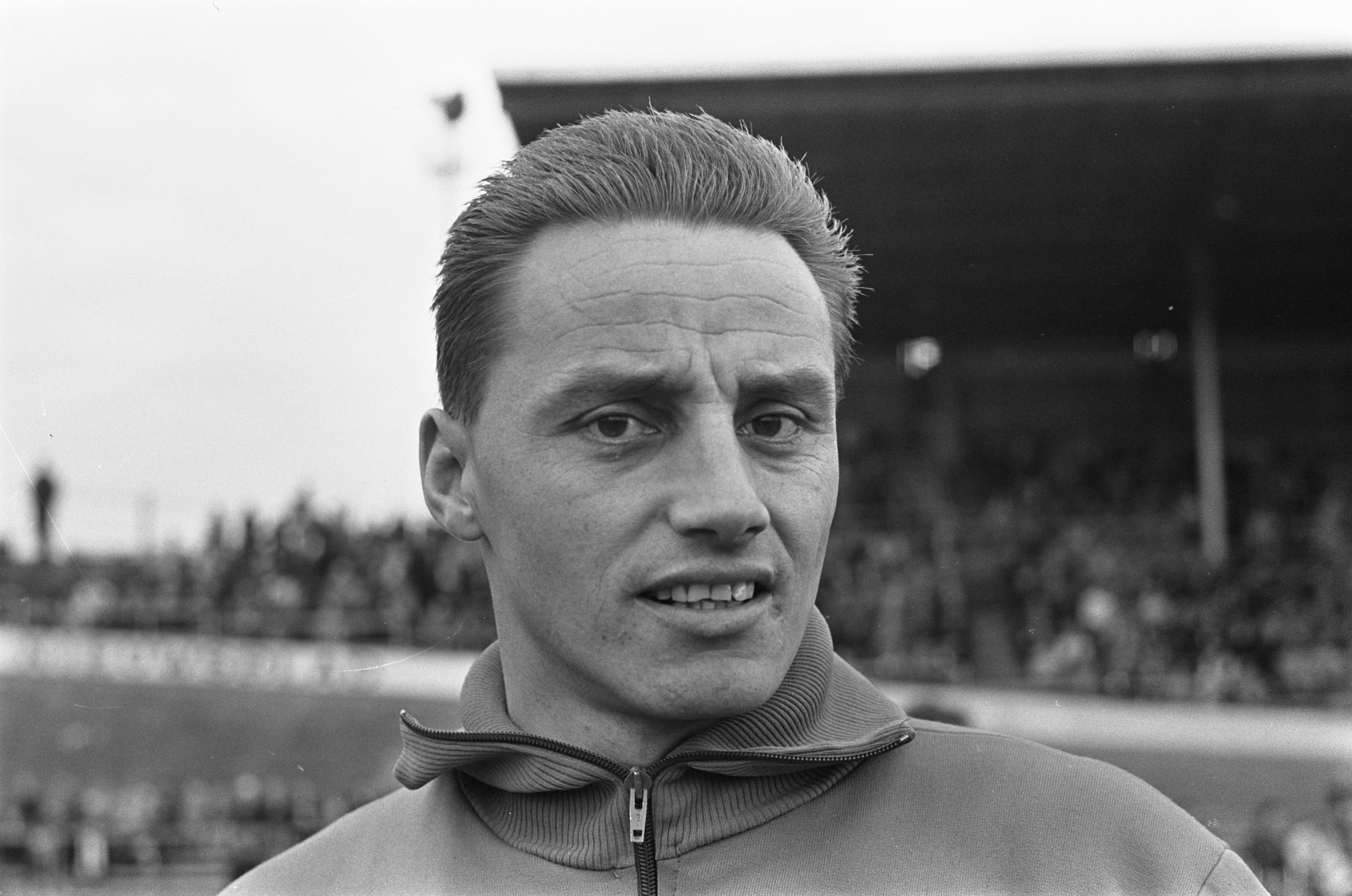 Collectie / Archief : Fotocollectie Anefo Reportage / Serie : [ onbekend ] Beschrijving : Trainer van de voetbalclub Telstar Dhr. Piet de Visser Datum : 6 oktober 1966 Trefwoorden : portretten, sport, trainers, voetbal Persoonsnaam : Visser, Piet de (voetbal) Fotograaf : Jongerhuis, Pieter / Anefo Auteursrechthebbende : Nationaal Archief Materiaalsoort : Negatief (zwart/wit) Nummer archiefinventaris : bekijk toegang 2.24.01.05 Bestanddeelnummer : 919-6503